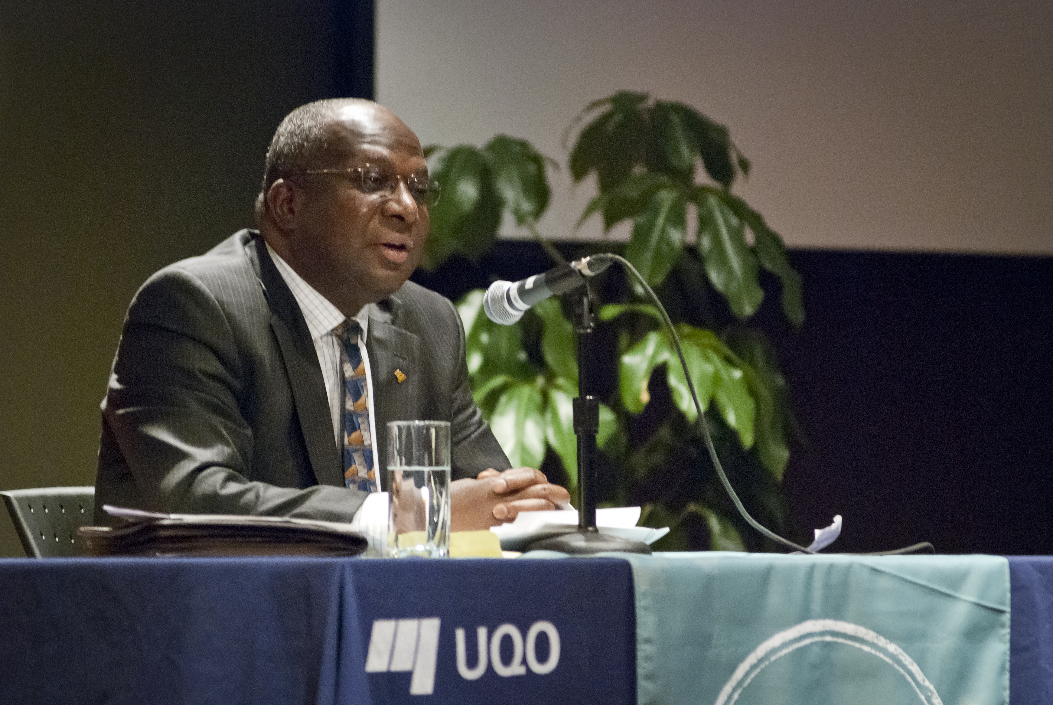 Yao Assogba